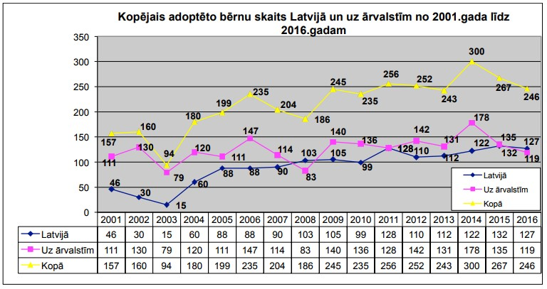 Kopējais adoptēto bērnu skaits Latvijā un uz ārvalstīm no 2001.gada līdz 2016.gadam